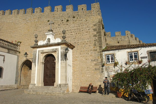 Passos do Calvário / Via-Sacra de Óbidos Photography by Osvaldo Gago